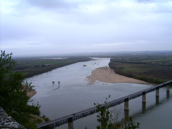 Ponte D. Luís I, vista das Portas do Sol.